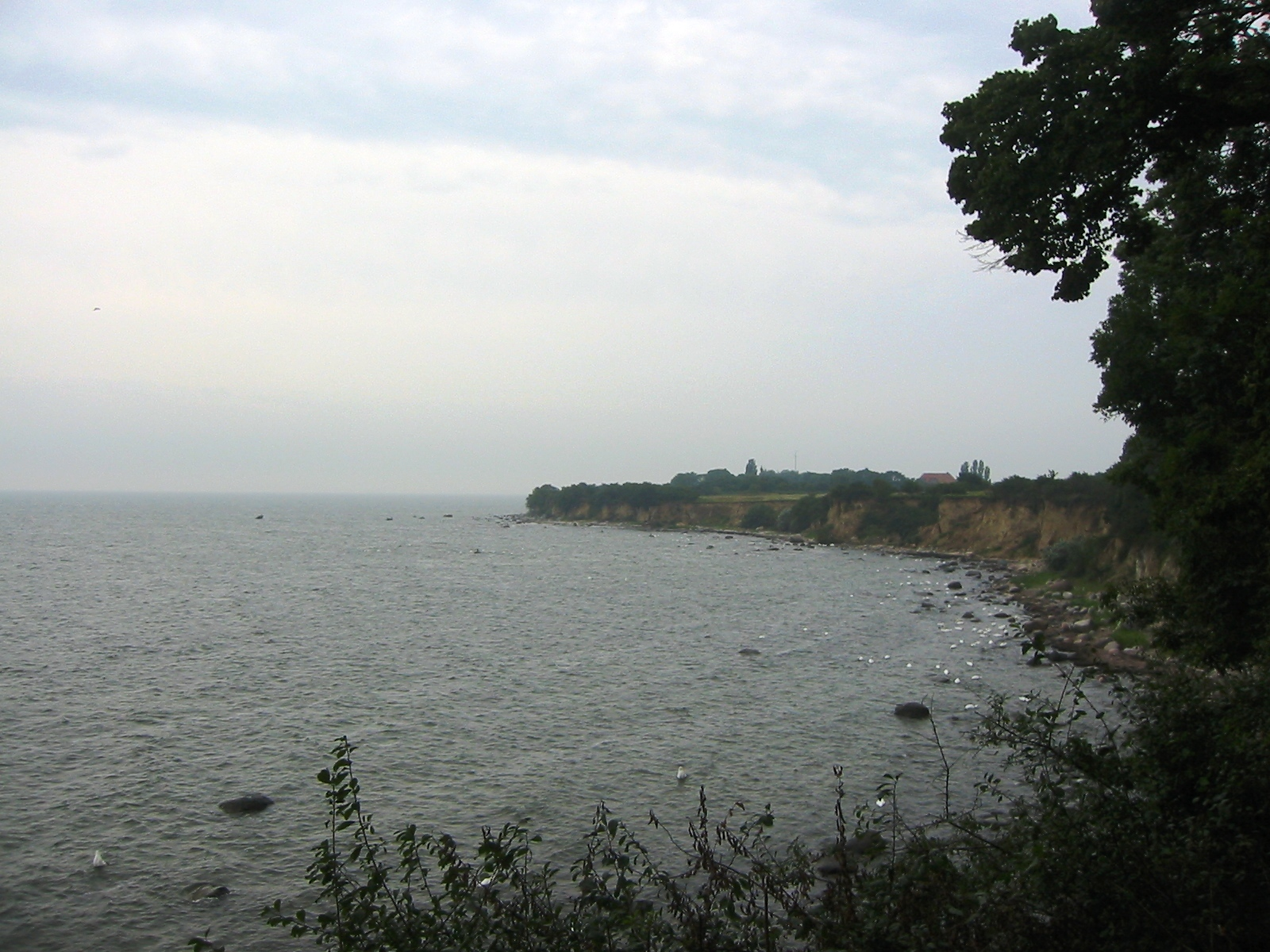 Steilküste der Greifswalder Oie